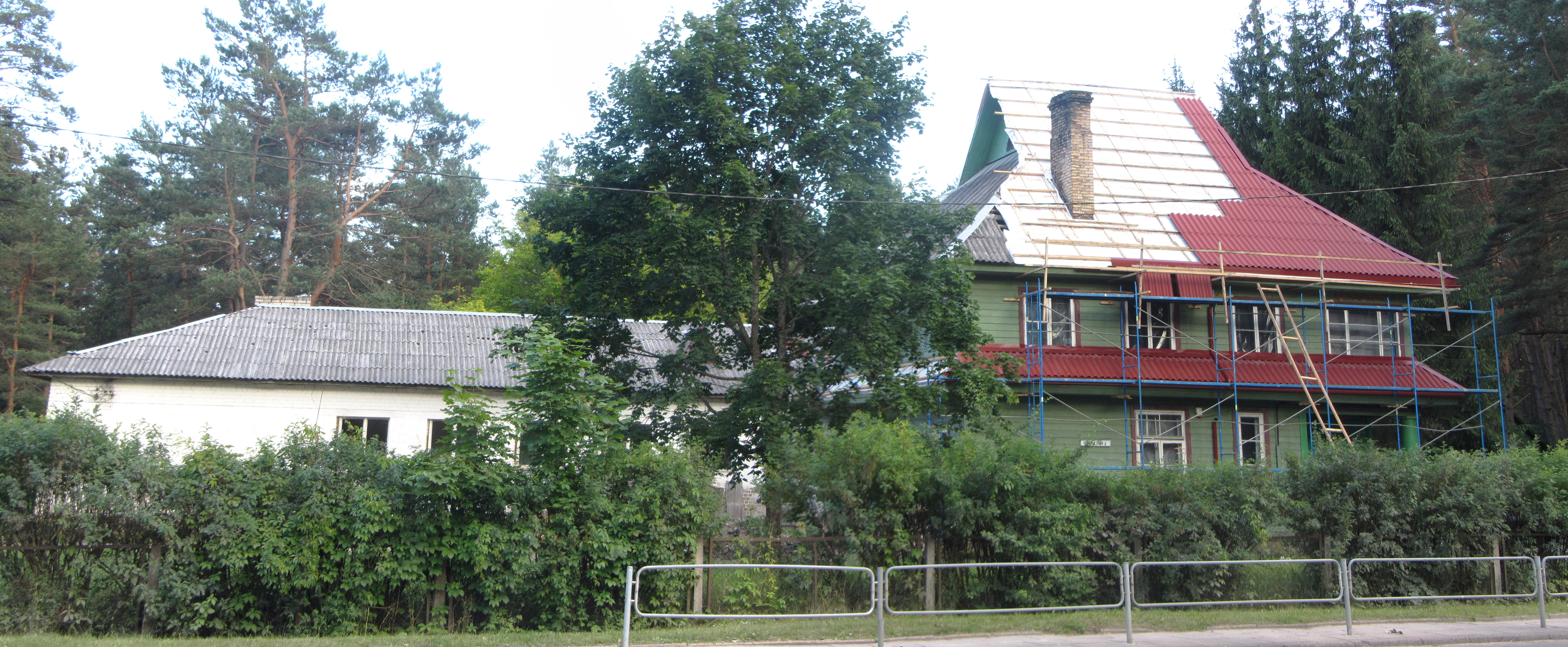 Vilnius, Lithuania